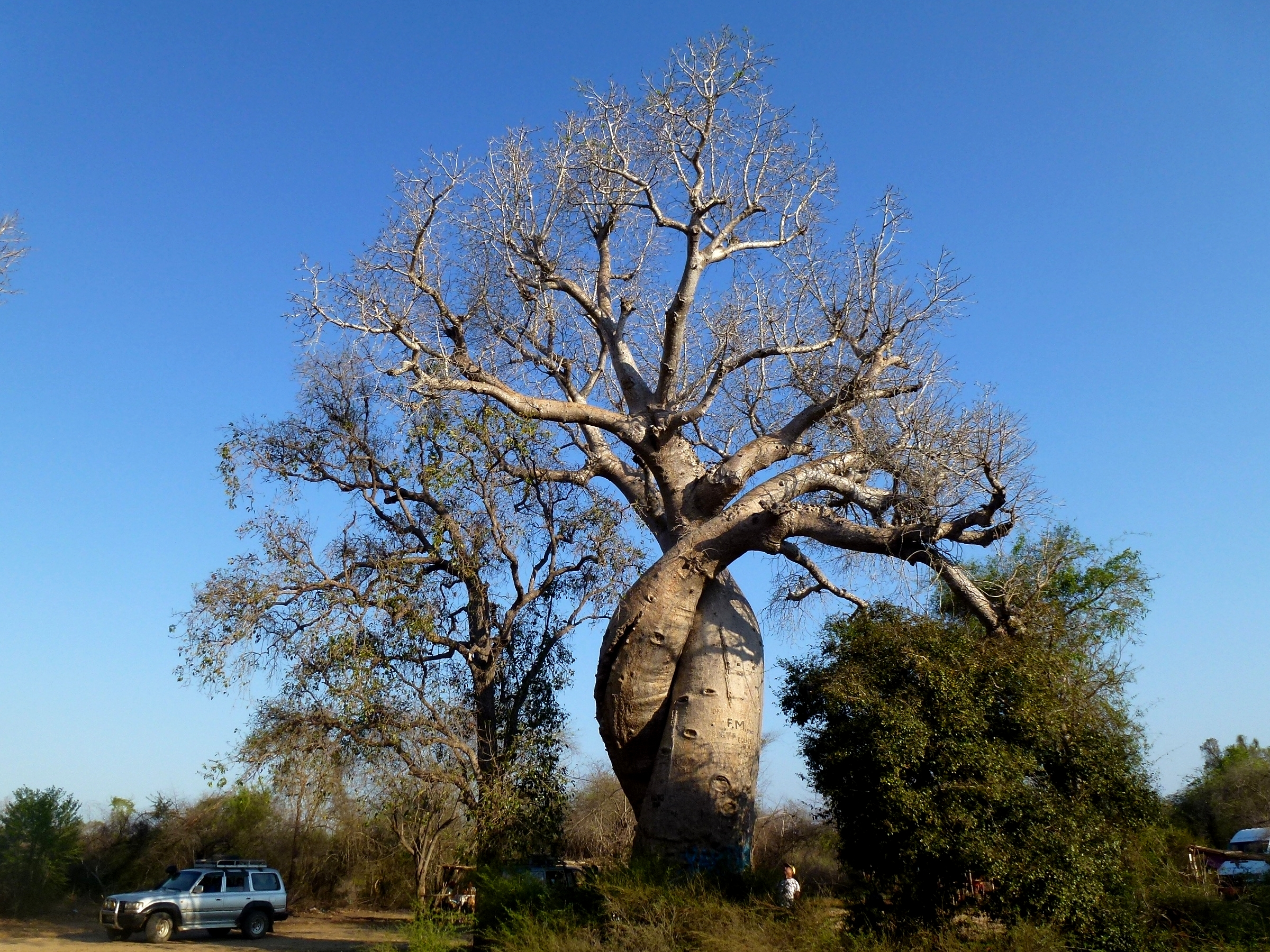 Amoureux Baobab Morondava Madagascar